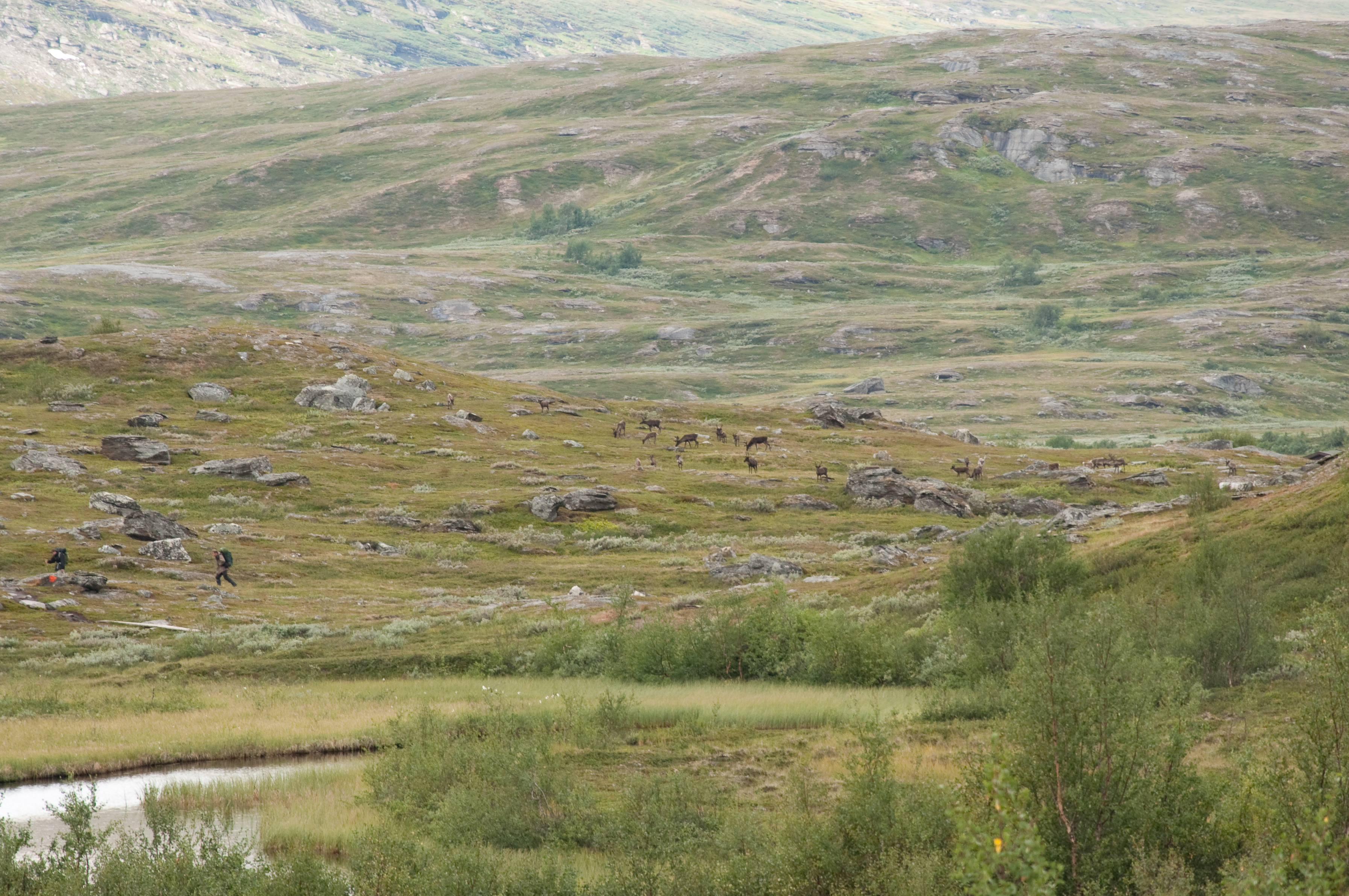 Reindeer in Padjelanta national park